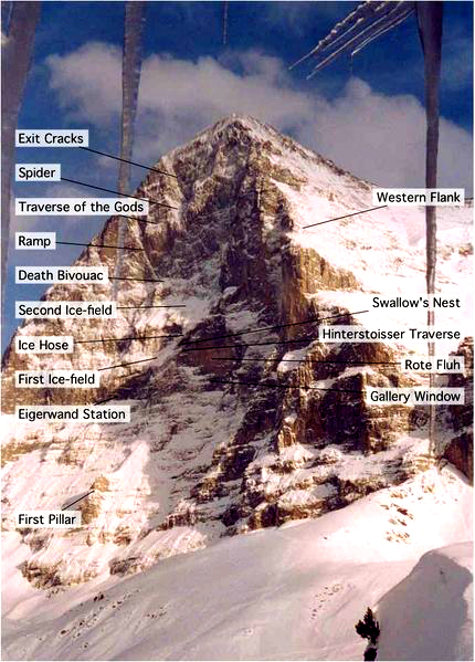 Dagramm vun der Eiger-Nordwand.